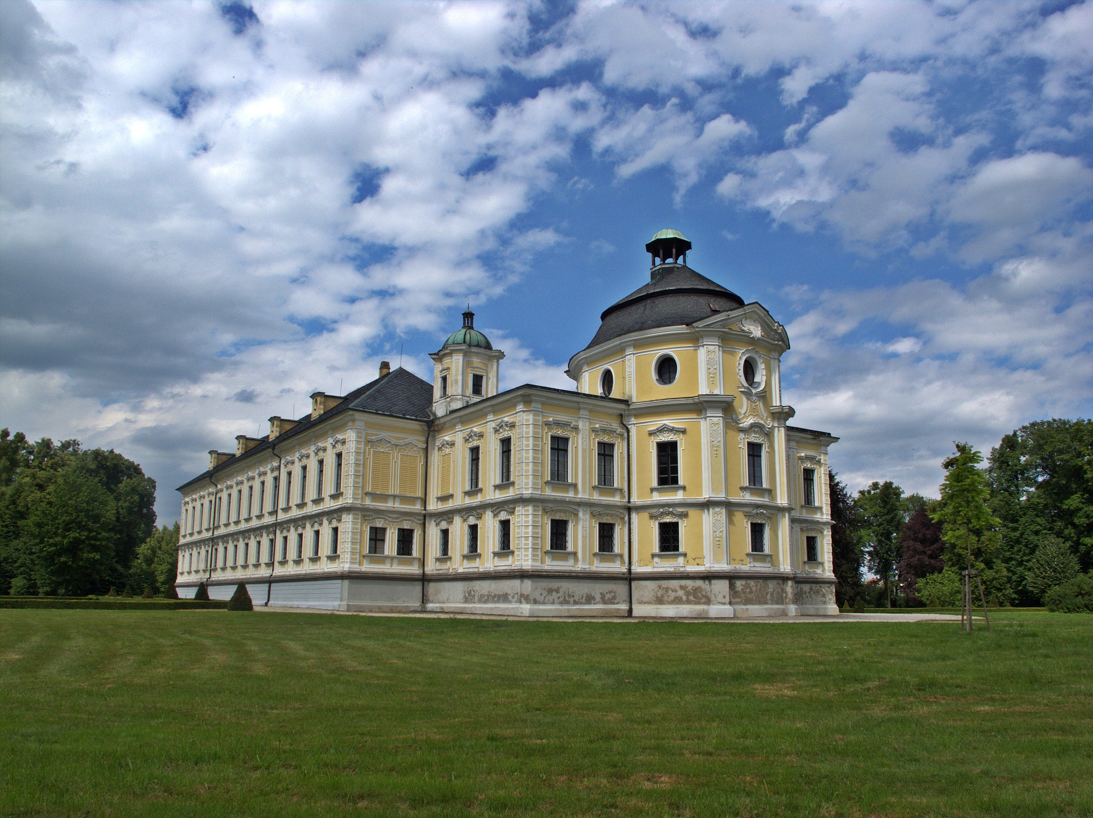 Zámek Kravaře s parkem, Alejní 377/24, Kravaře.